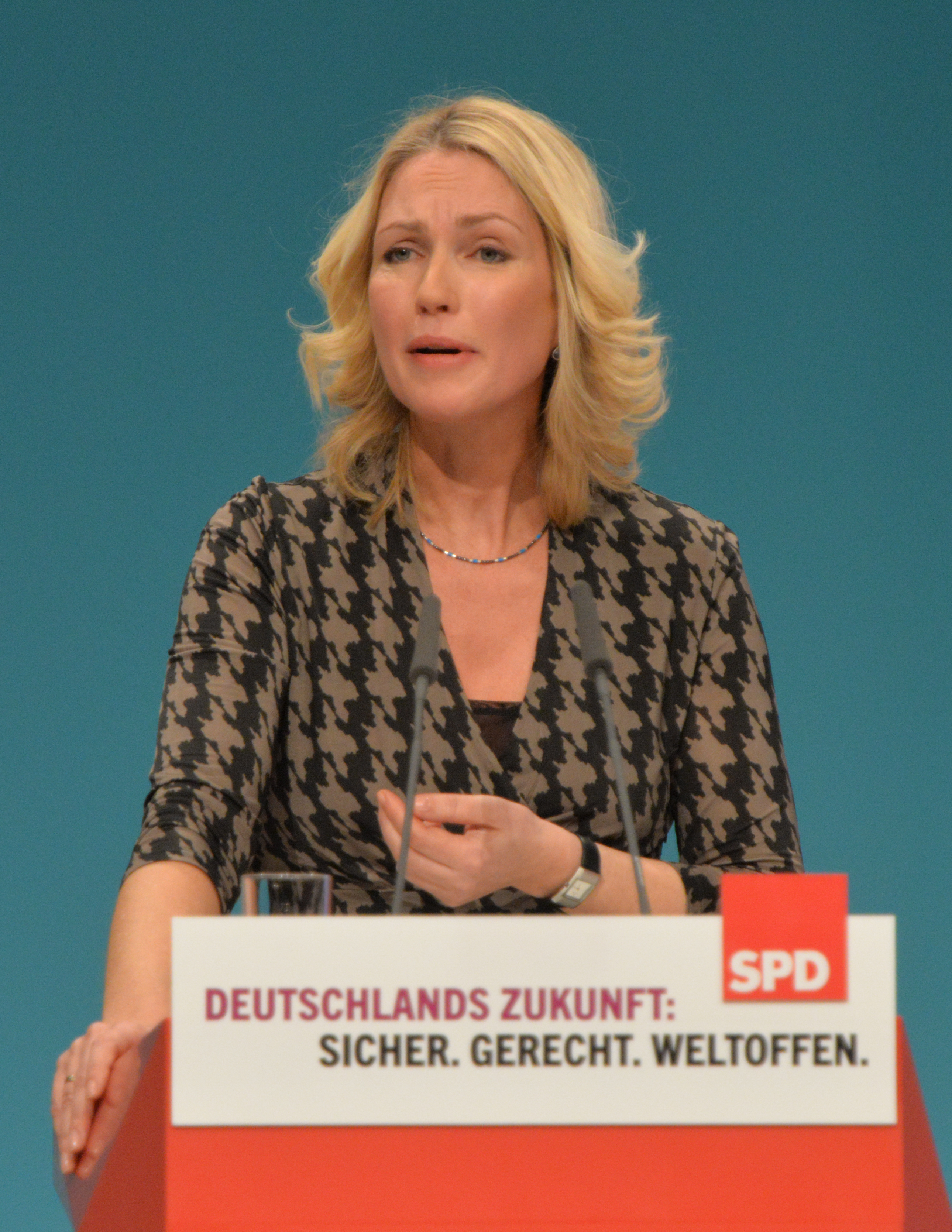 SPD Bundesparteitag Berlin, 10.-12. Dezember 2015, CityCube, Messe Berlin